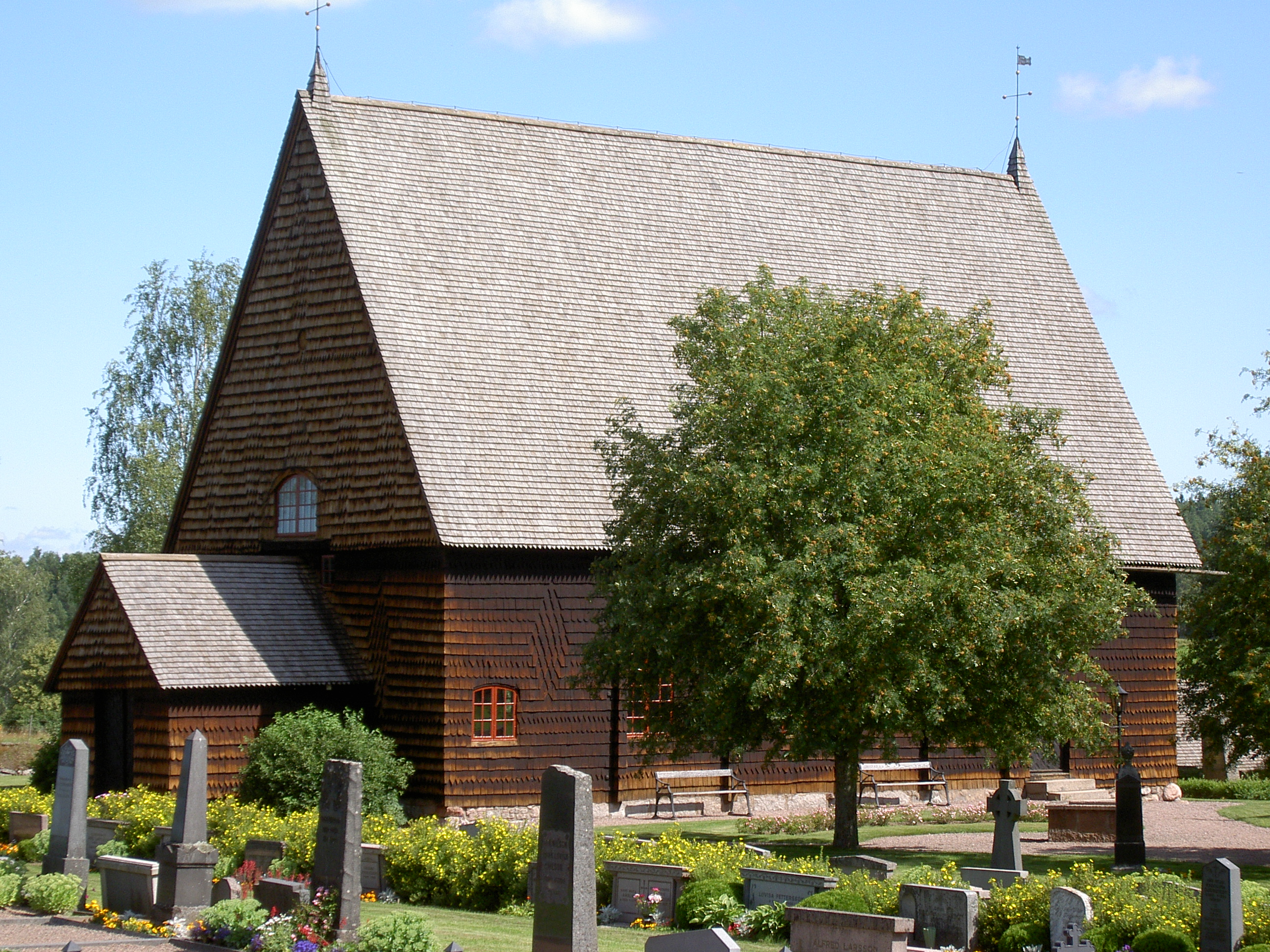 Djursdala kyrka